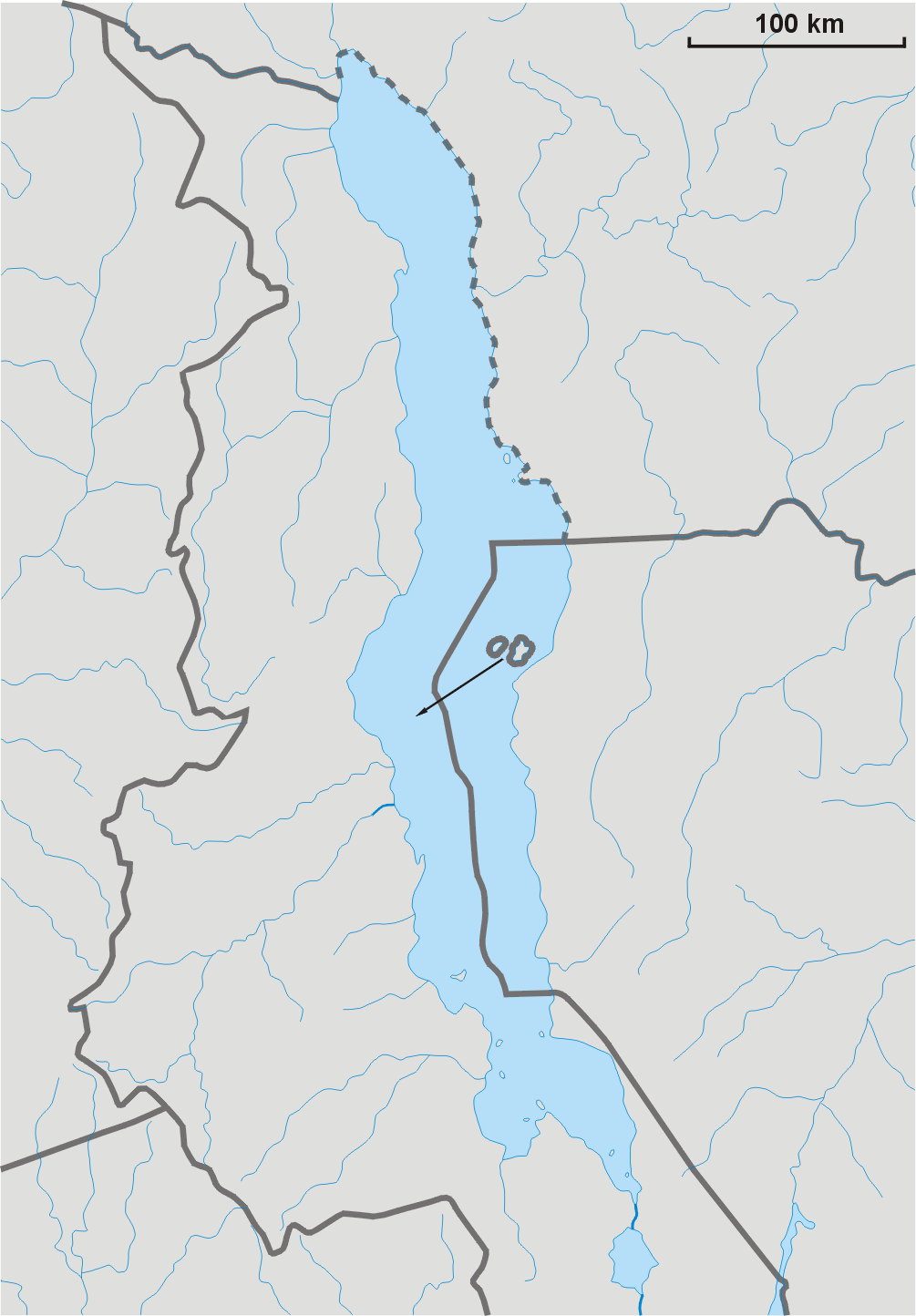 Map of Lake Niassa (Lake Malawi)